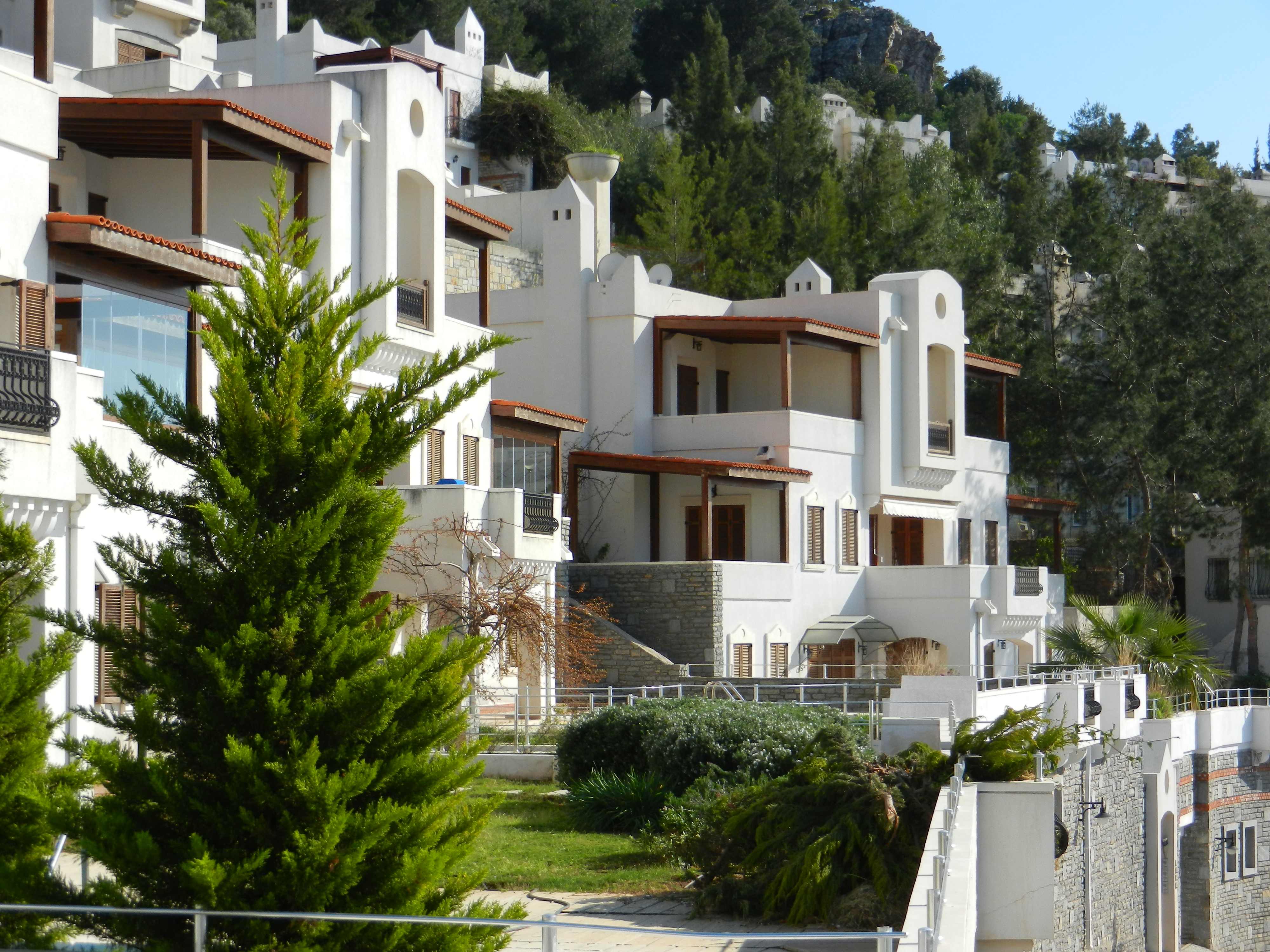 Bodrum Akçabük Evleri